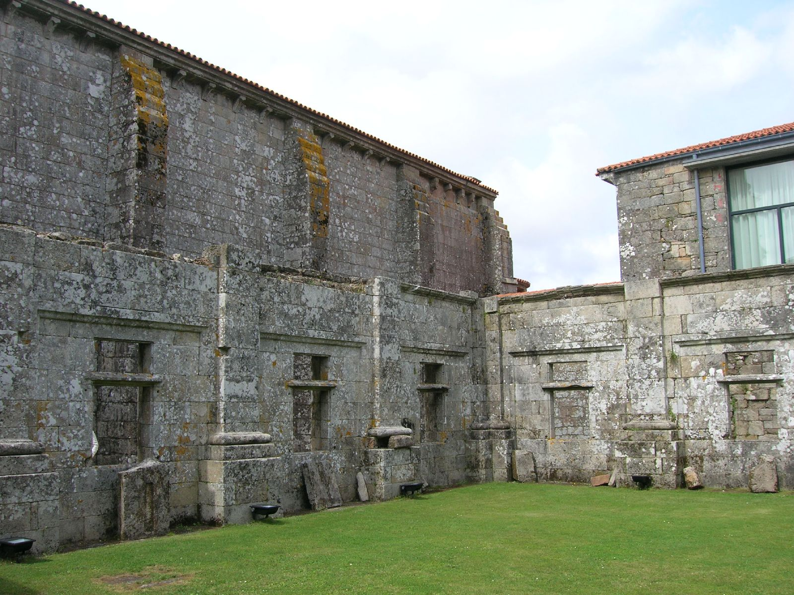 Claustro das Procesións do Mosteiro de Aciveiro